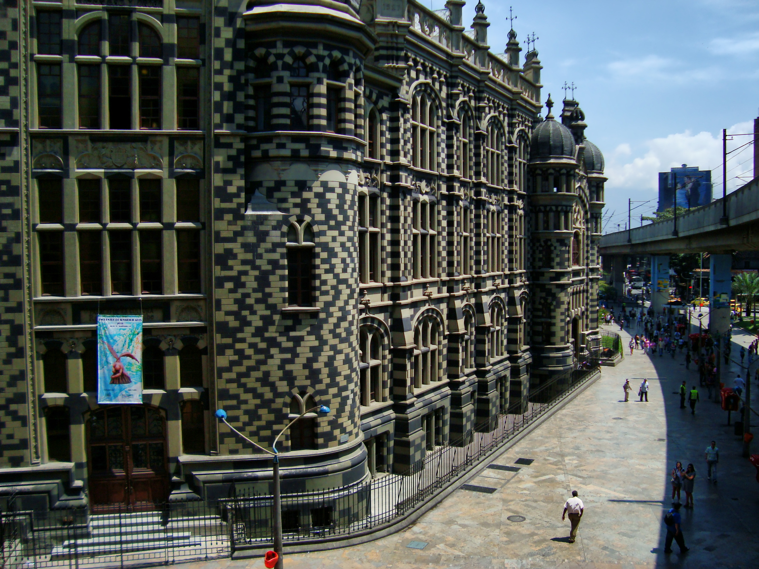 Palacio de la Cultura Rafael Uribe Uribe